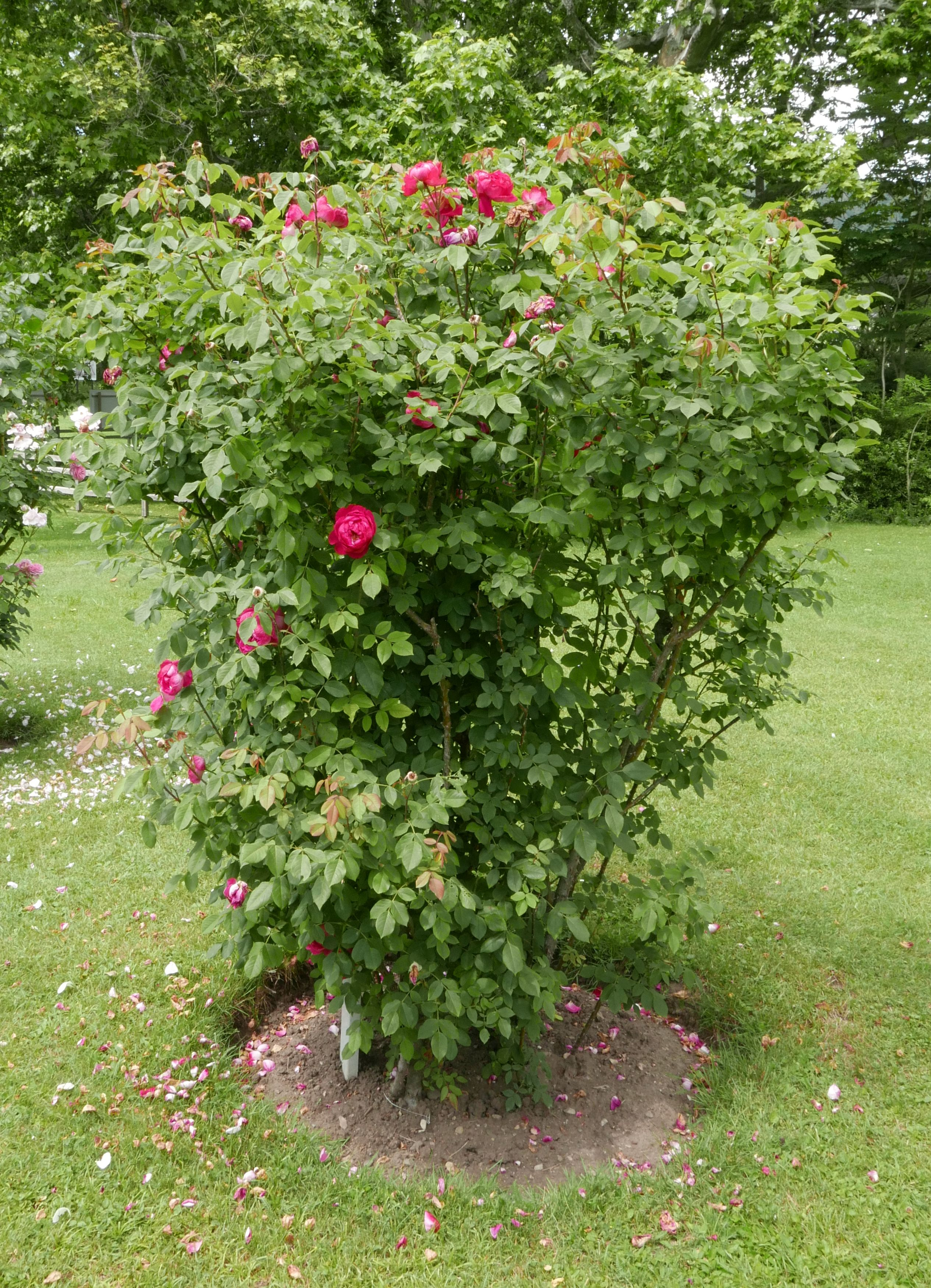 Rosarium Baden im Doblhoffpark (BD-122) Rosa 'Benjamin Britten' David Austin (2001), fotografiert im Juni 2018 This media shows the natural monument in Lower Austria with the ID BD-122.